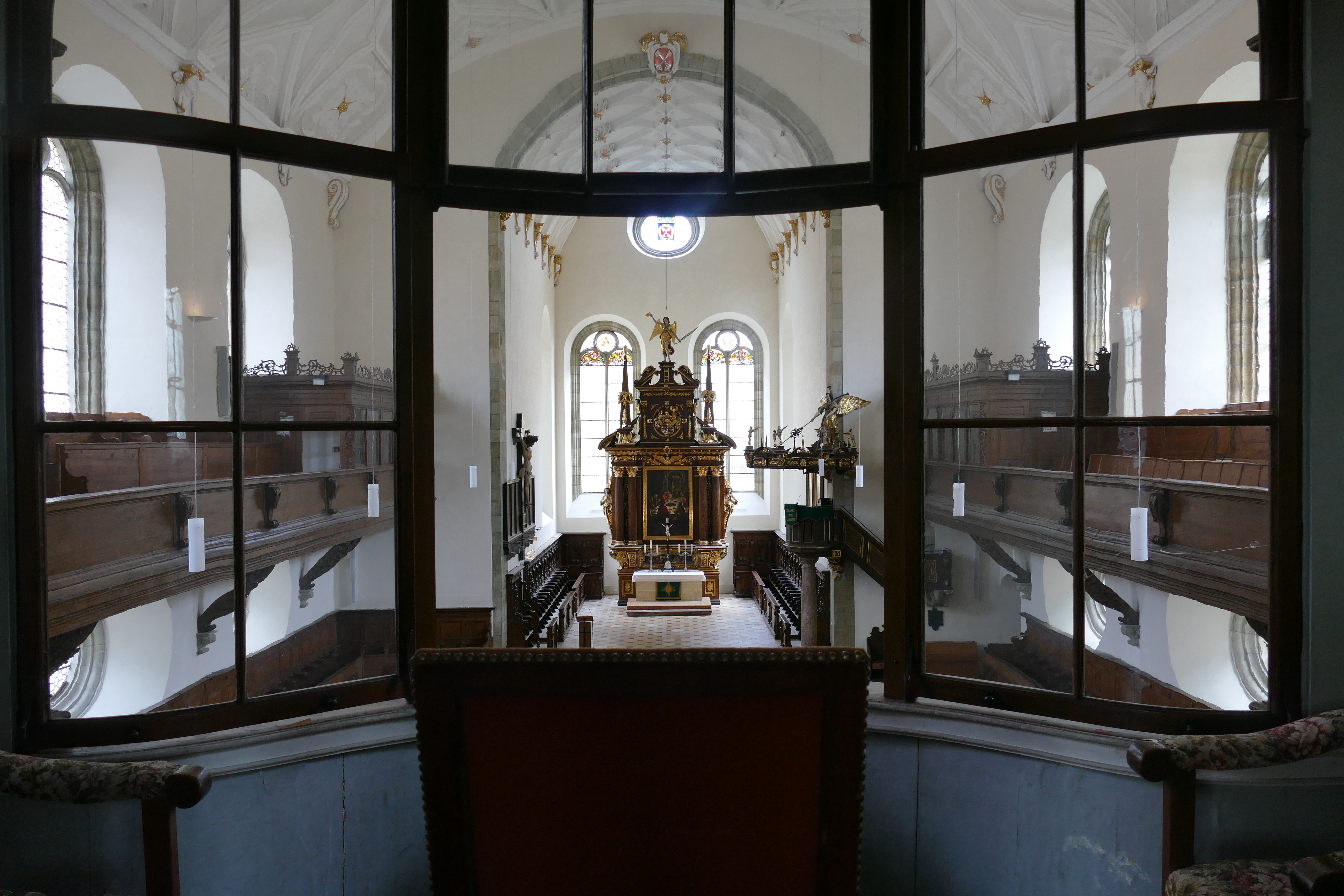 Bei der Heirat des katholischen Prinzen Alexander von Thurn und Taxis mit der protestantischen Therese von Mecklenburg-Strelitz wurde vereinbart, dass in der protestantischen Dreieinigkeitskirche ein Oratorium für sie eingebaut würde. Die 17jährige Prinzessin hatte sich geweigert wegen der Heirat zum Katholizismus überzutreten. Der Einbau bewirkte eine Starke bauliche Veränderung der Kirche.